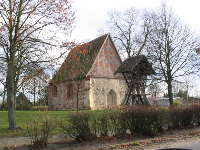 Kirche Goldenstädt, church of Goldenstaedt, Germany